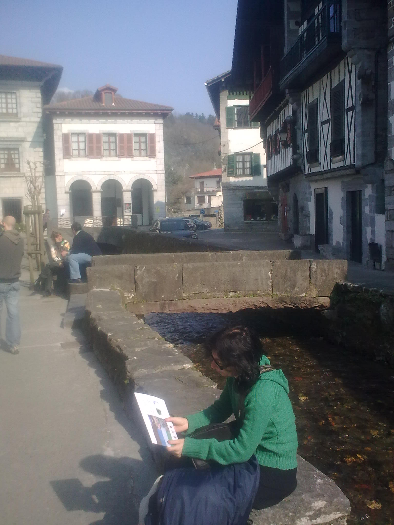 Atzealdean, Eskol Ttiki etxe arkupeduna; aurrealdean, Onin erreka.